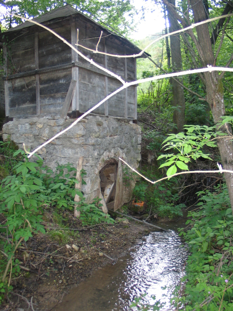 Selo Sitarice